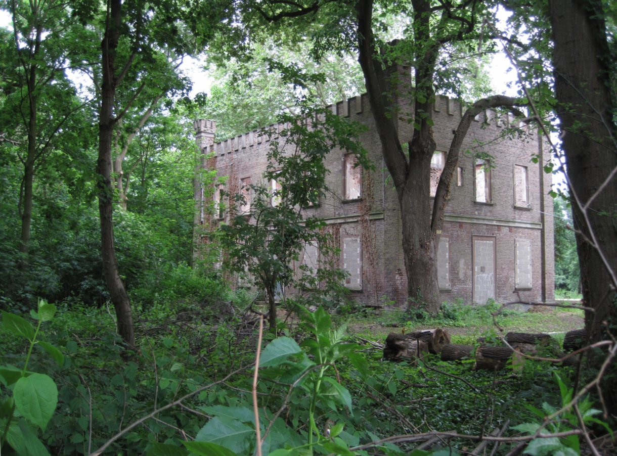 Ruine Haus Orr bei Pulheim